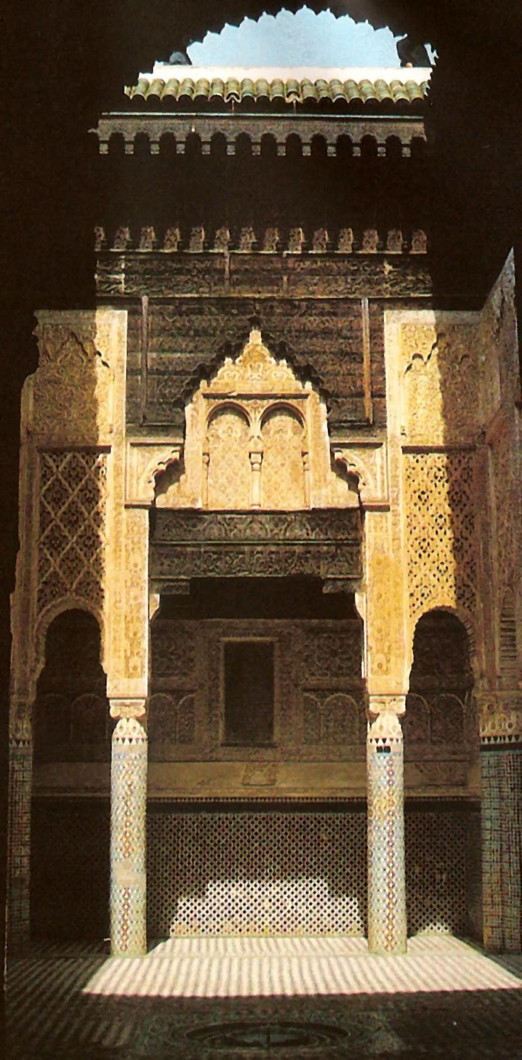 école mérinide à Salé datant du XIVe siècle.